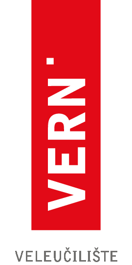 Logotipo da Universidade VERN'.